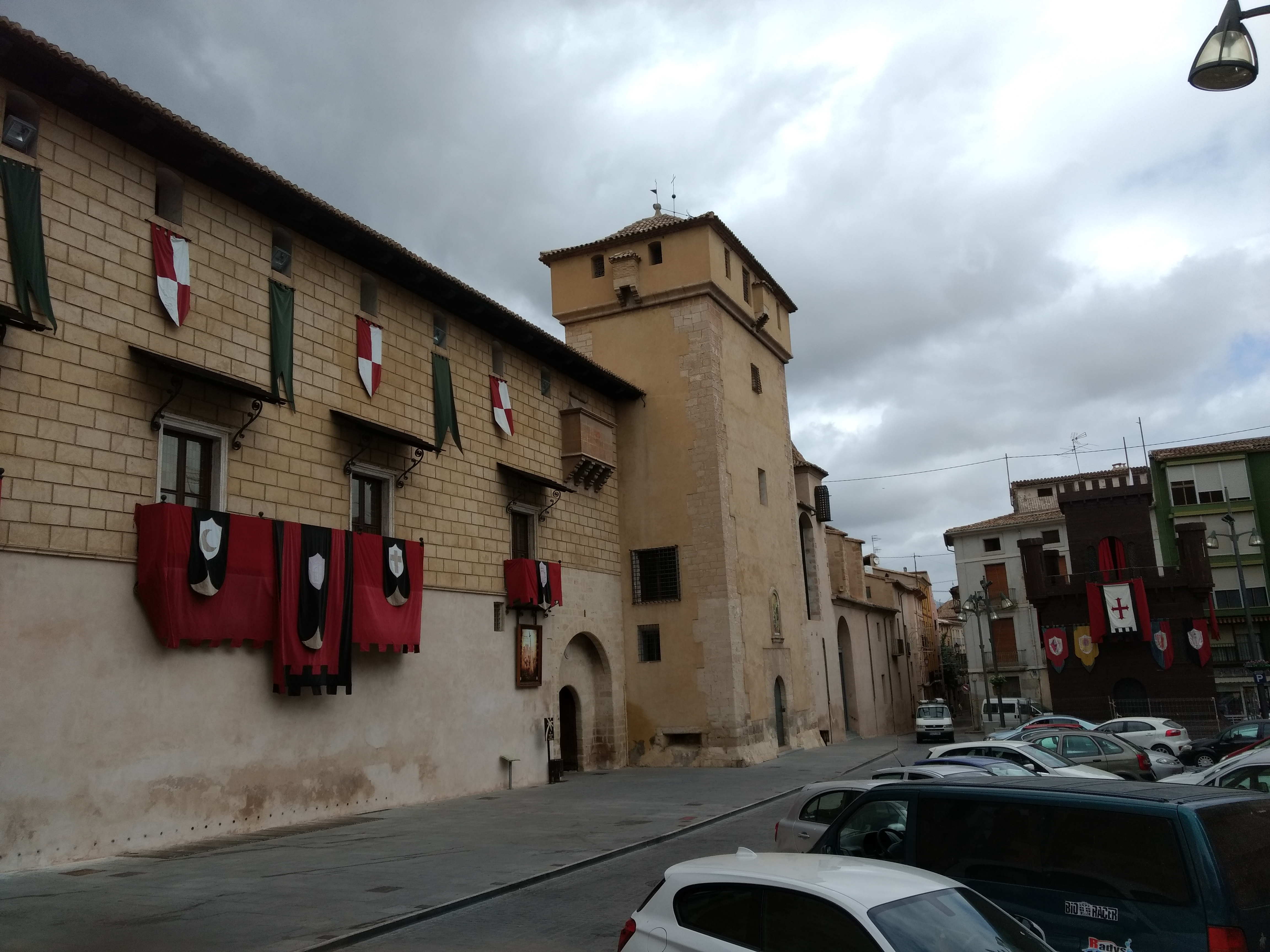 Cocentaina, agost de 2016.